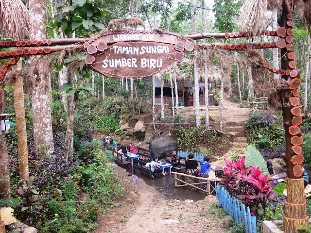 Wisata alam Sumber Biru, Jombang